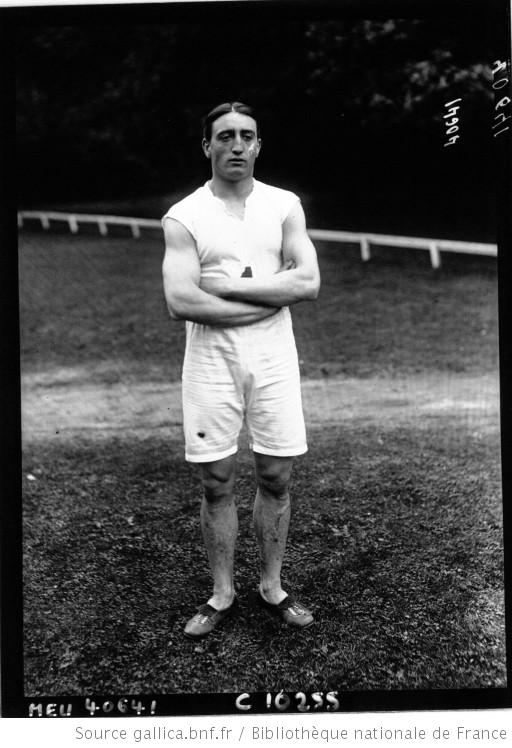 Pierre Failliot en 1913.